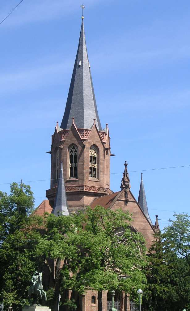 Christuskirche in Karlsruhe mit zahlreichen Glasfenster vom Schweizer Glasmaler Albert Lüthi (1858-1903)